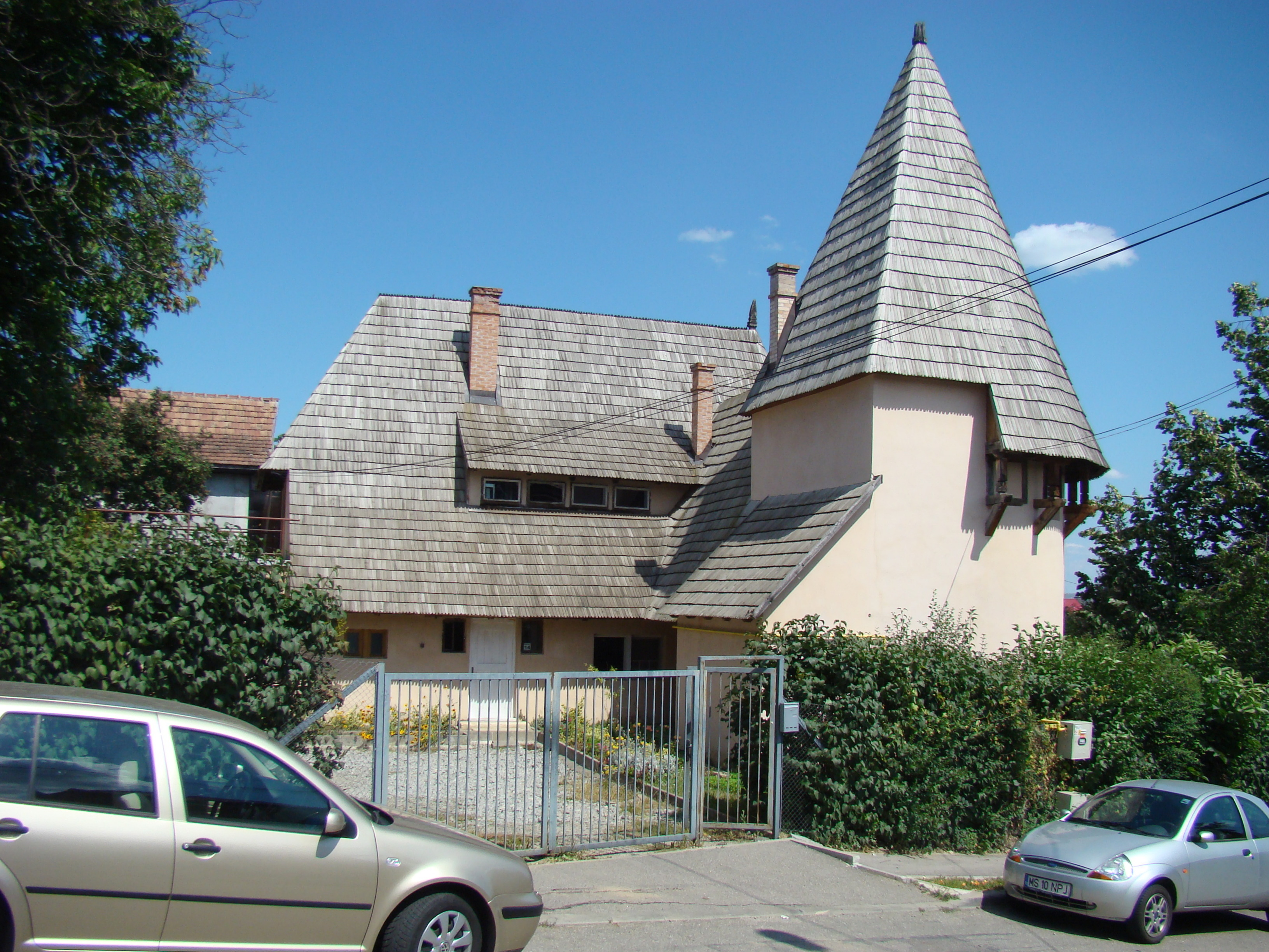 Clădire monument istoric, str.Breaza, nr.14 (Casa proiectată de arhitectul Kos Karoly)